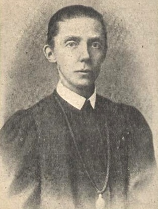 Die selige Maria Teresia Ledóchowska (1863-1922)